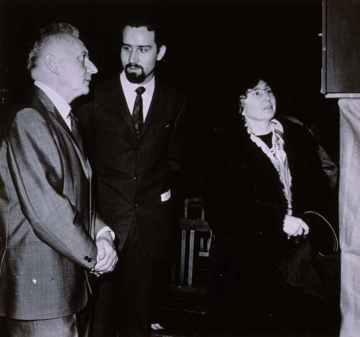 Théâtre universitaire de Strasbourg - Maurice Bayen, recteur de l'Université de Strasbourg, en compagnie de Jean Hurstel, secrétaire général du théâtre universitaire, et d'Edith Bernardin